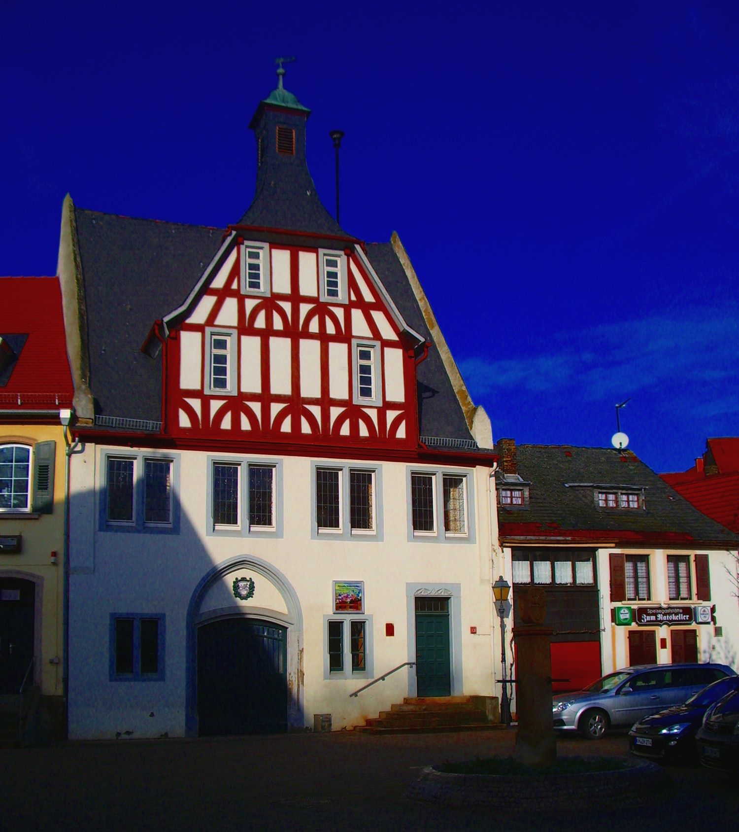 Marktplatz Obermoschel mit dem Rathaus (links)